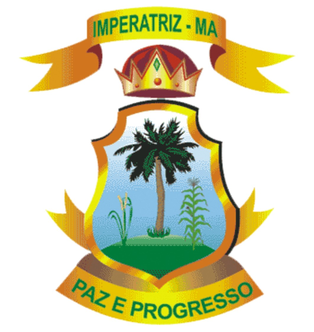 Coat of arms of Imperatriz city in Maranhão, Brazil. All the images of Brazilian states' flags and coat of arms (official symbols) are in public domain. Brasão da cidade de Imperatriz no Maranhão, Brasil. Todas as imagens de bandeiras de estados brasileiros e brasões (símbolos oficiais) estão em domínio público.